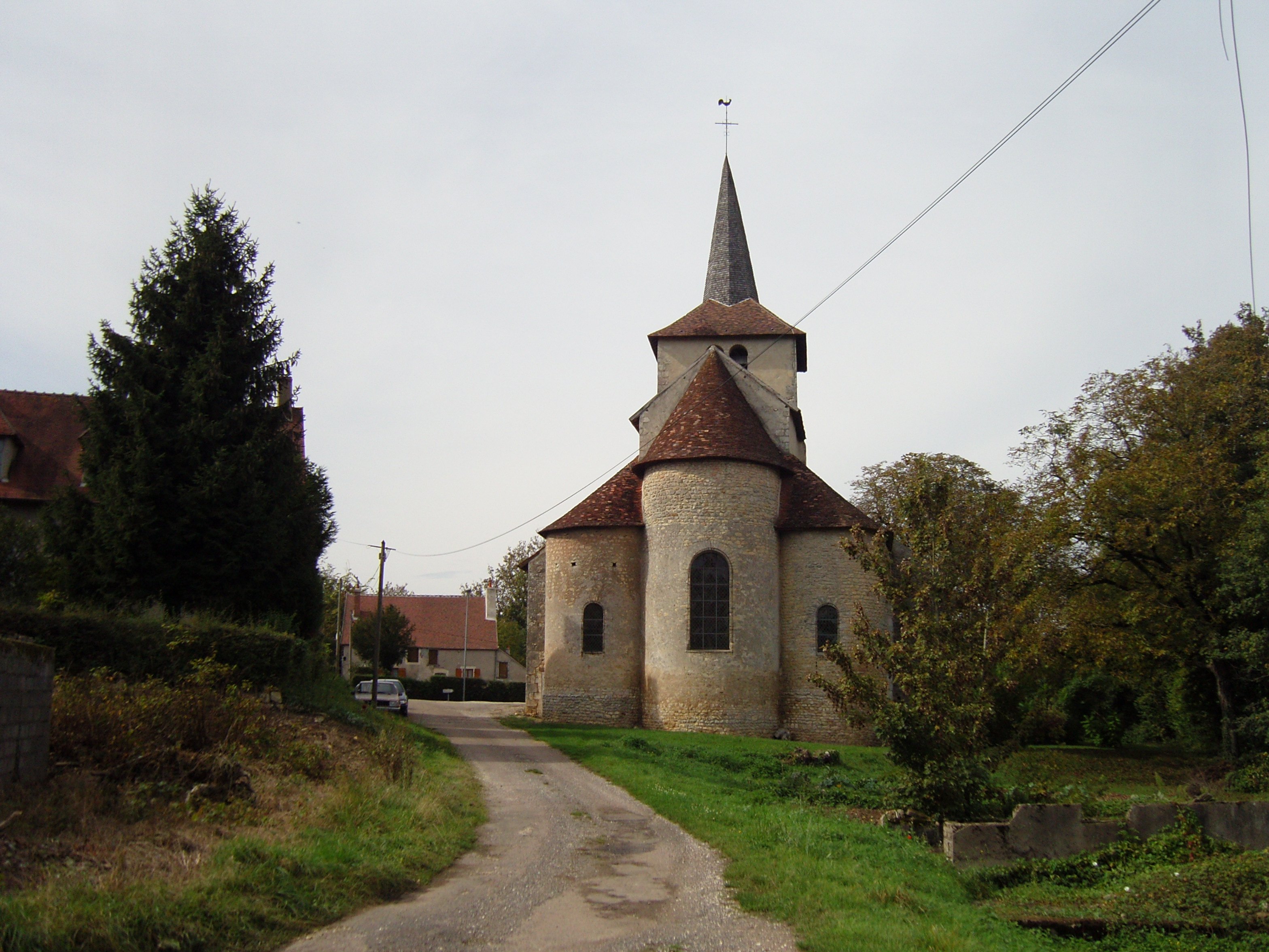 Champvoux, commune française, située dans le département de la Nièvre et la région Bourgogne.